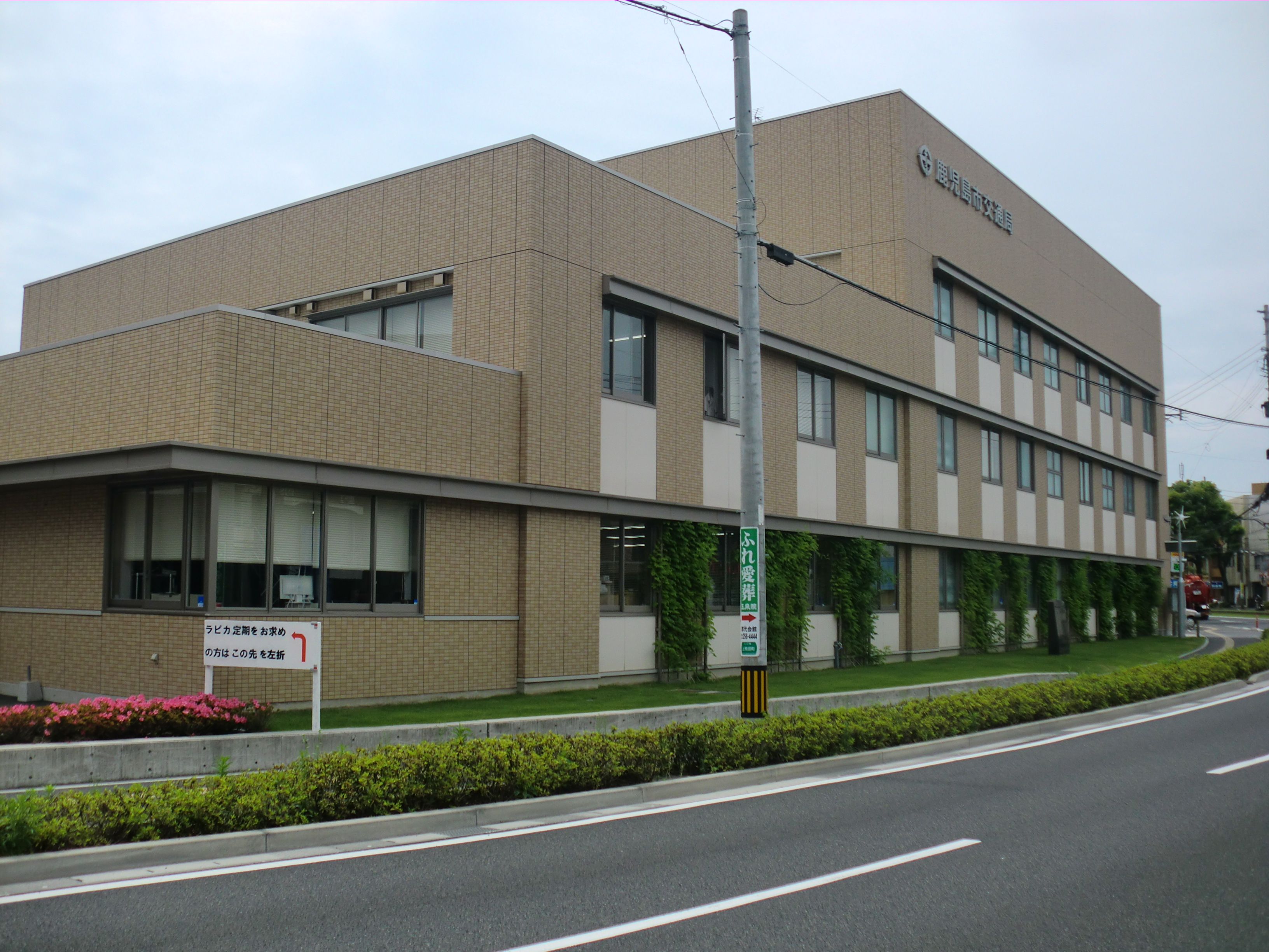 鹿児島市にある鹿児島市交通局